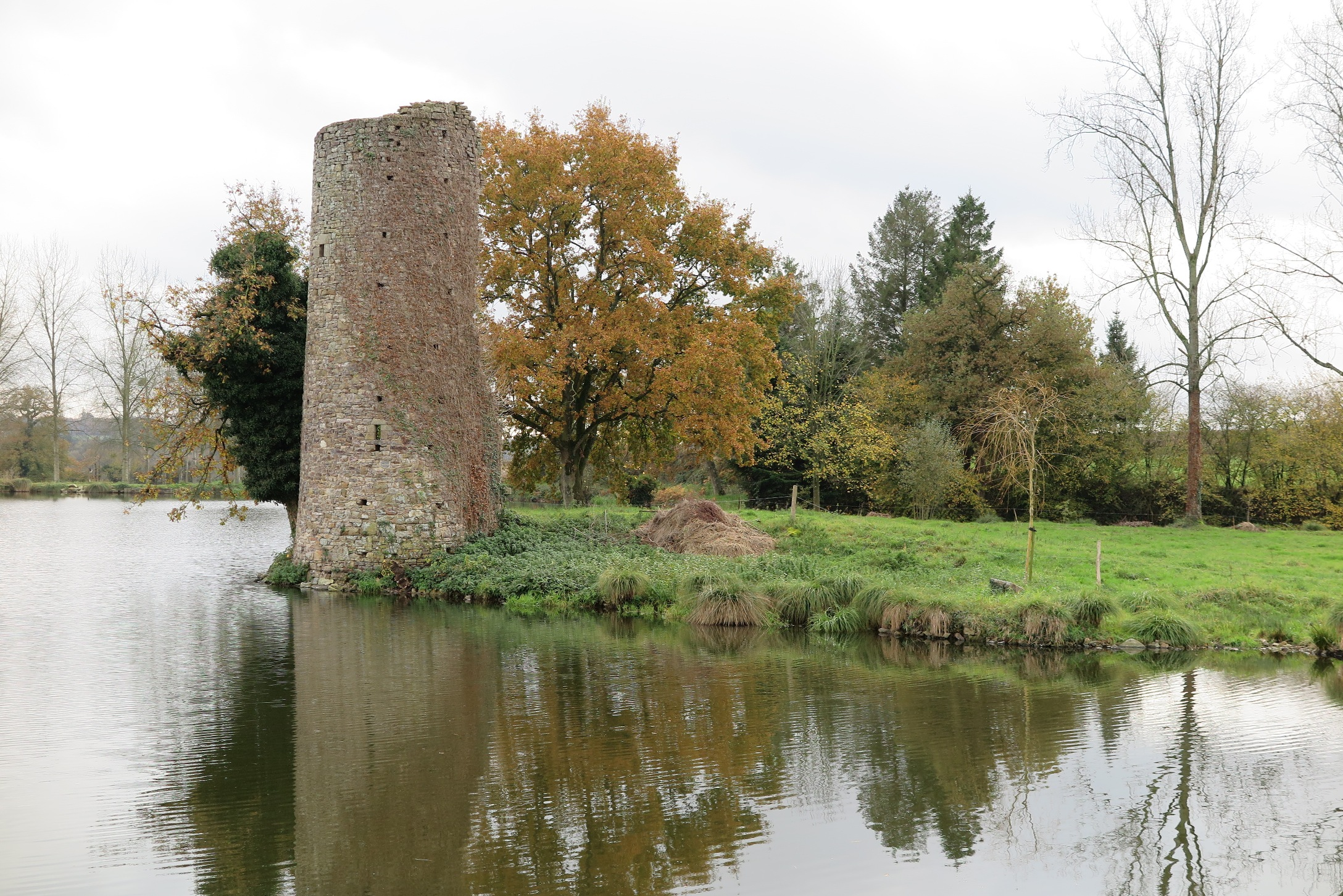 ruinedonjon du chateau de jumilly (chateau du diable)